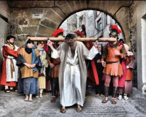 Moment de la representació de la Passió de Vilalba dels Arcs. Sessió diürna.